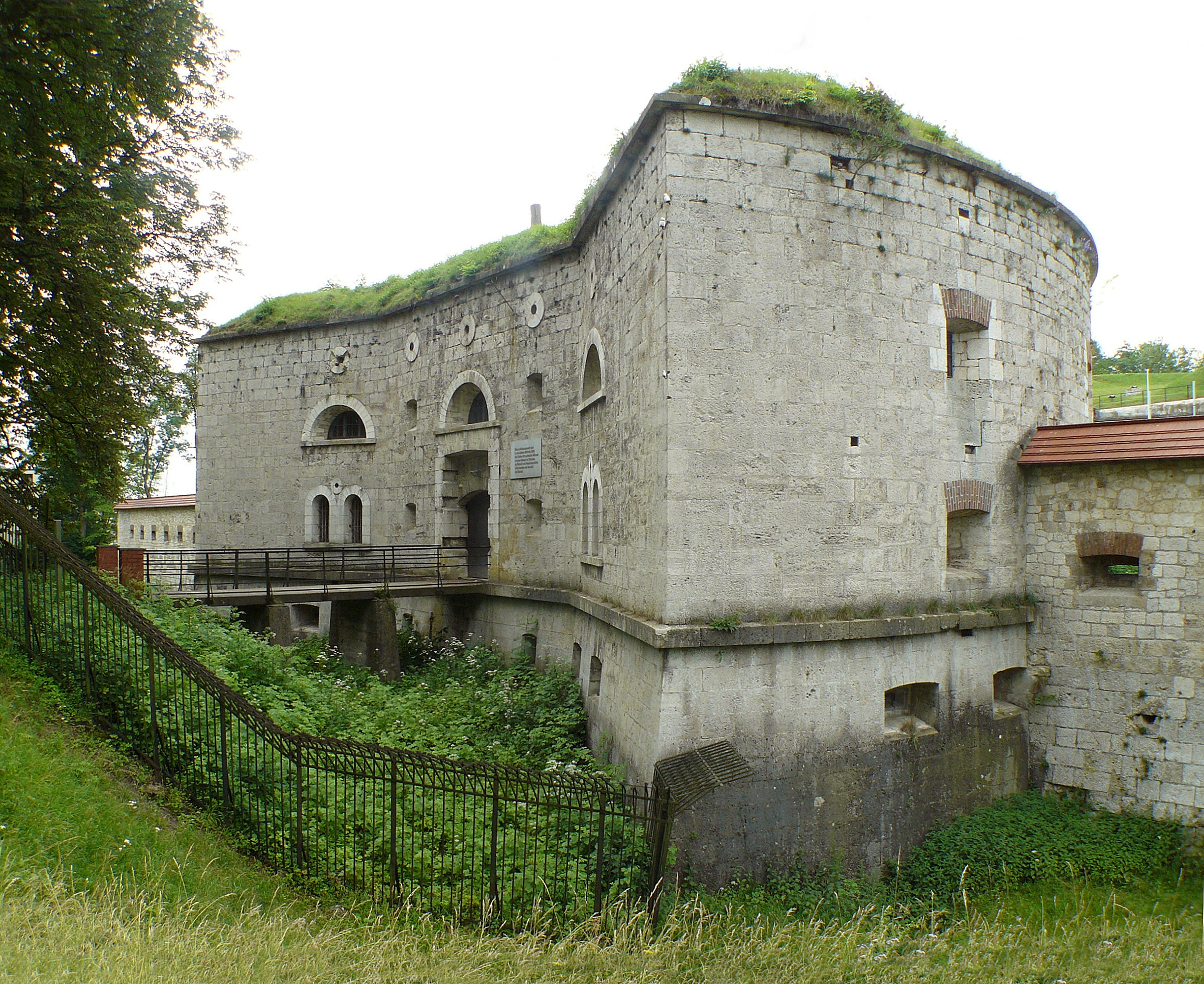 Reduit des Fort Oberer Kuhberg, ehemaliges KZ, bei Ulm